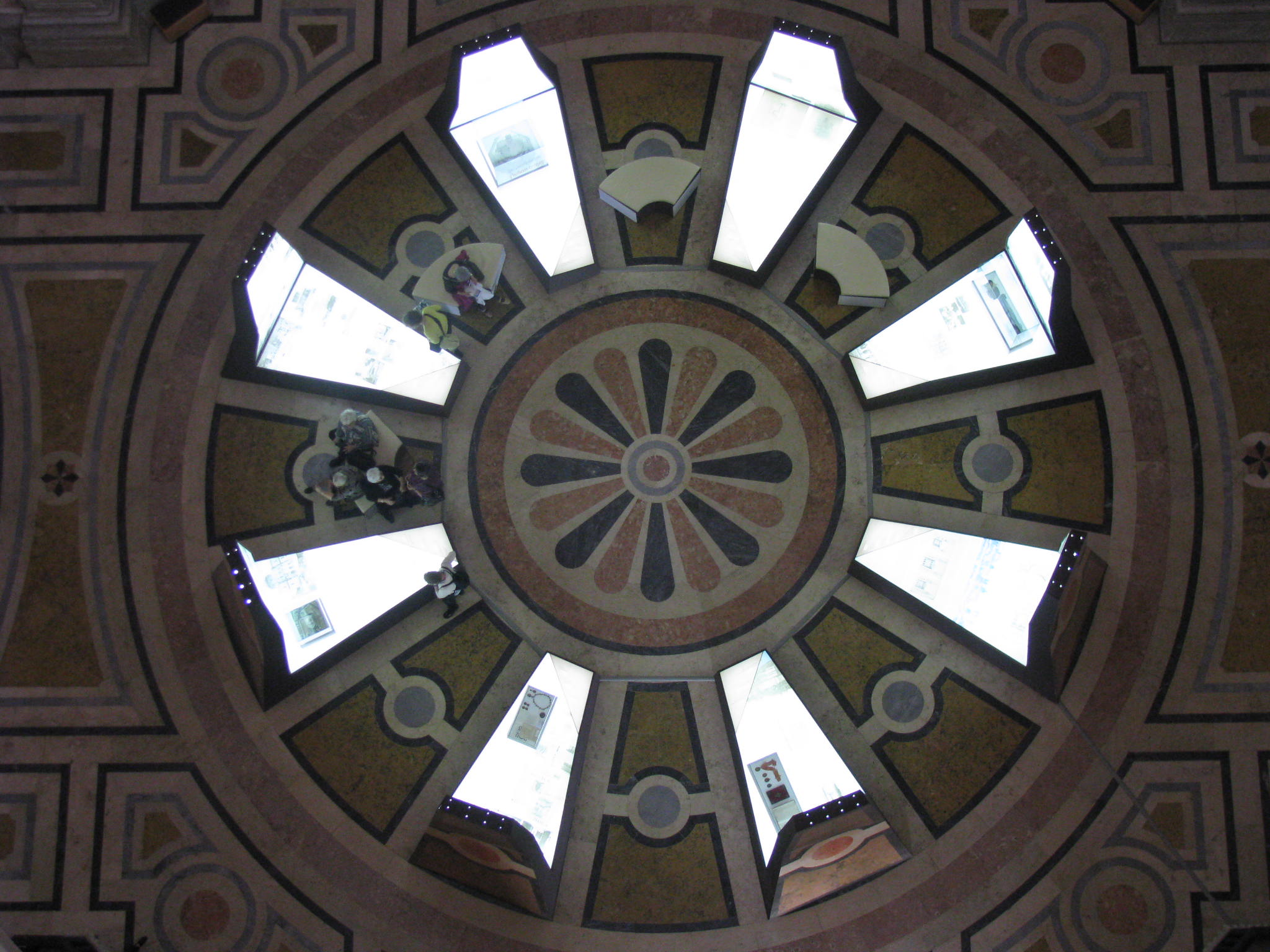 Com exposição alusiva ao Centenário da Republica This file was uploaded for Wiki Loves Monuments in Portugal with the unique identifier 71214.